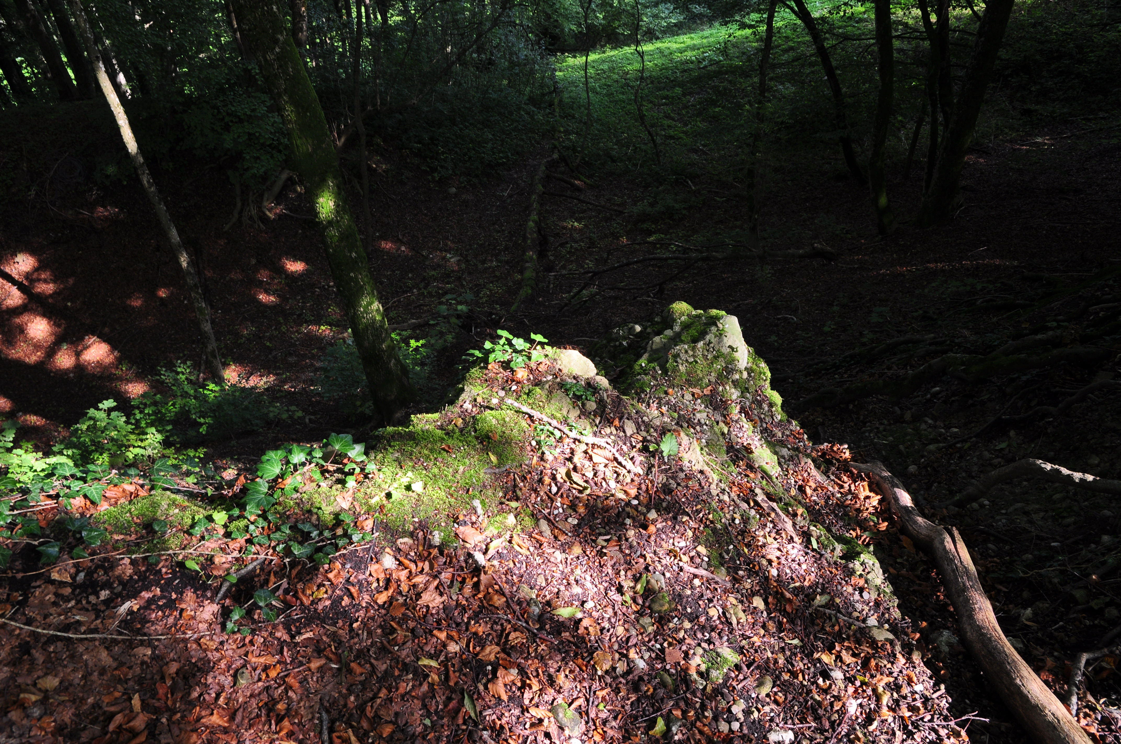 Greifenberg, Burgstelle in Bäretswil (Switzerland)